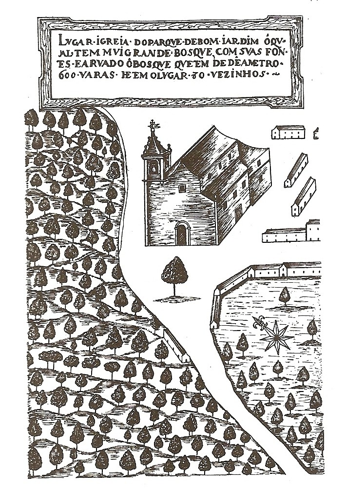 cernache do bonjardim